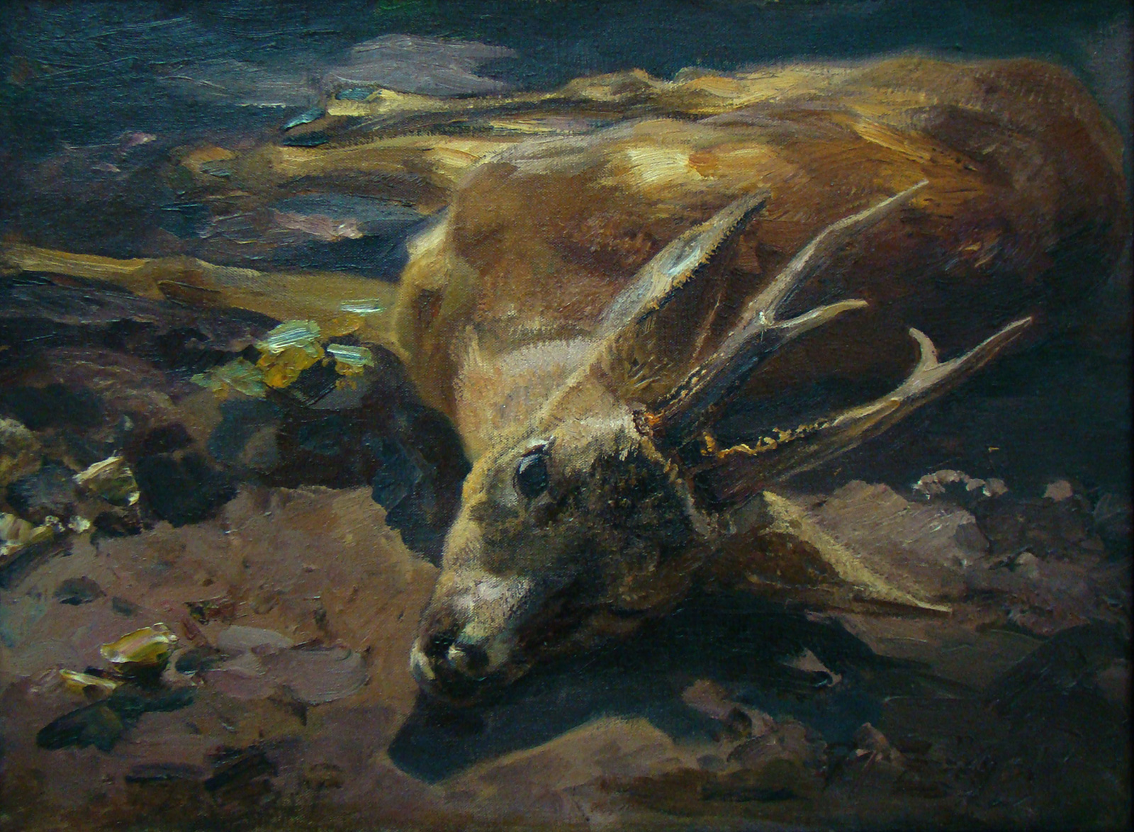 Jagdstück mit erlegtem Rehbock. Galerie der Stadt Murrhardt.